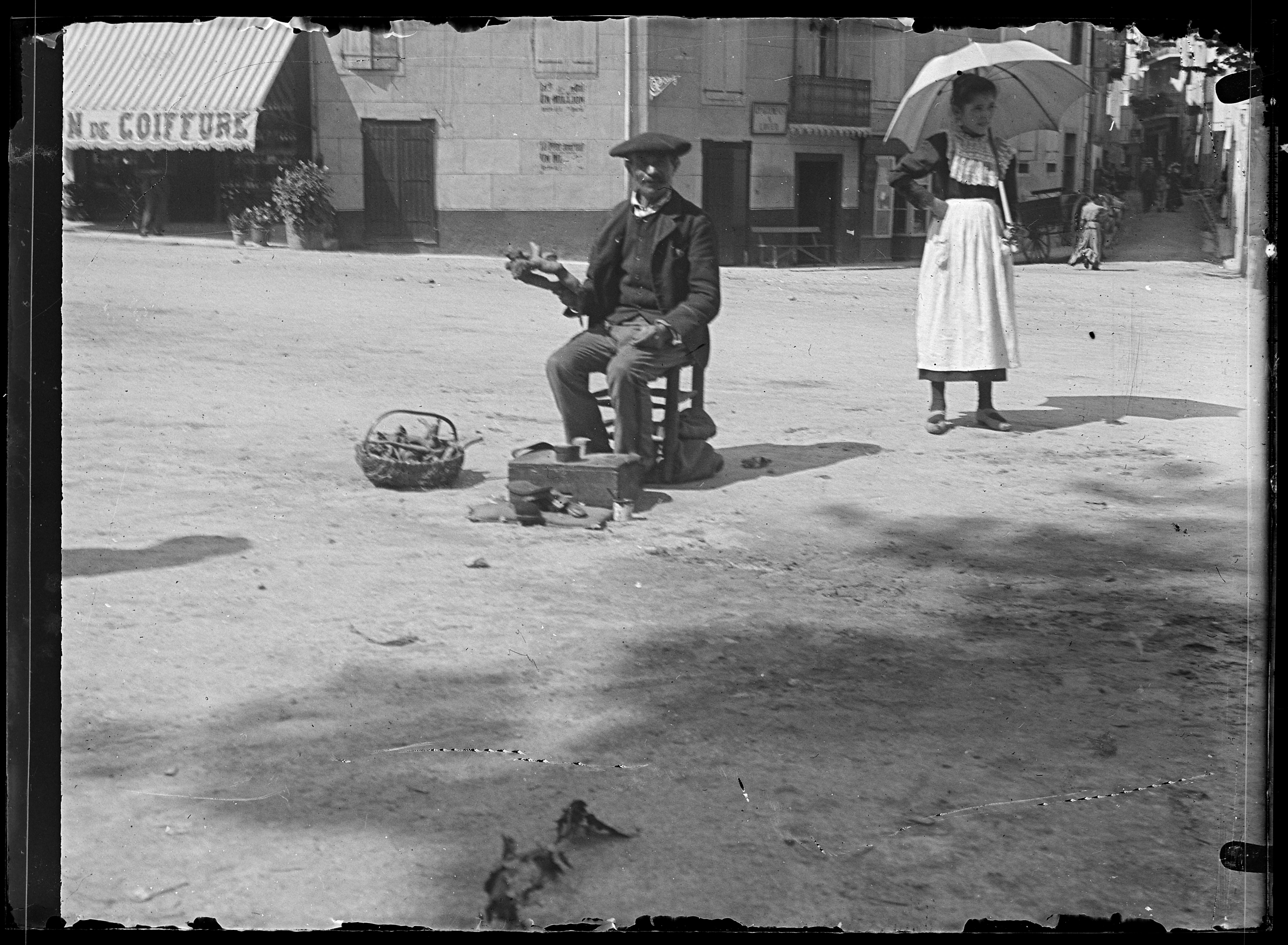 plaque négative au gélatino-bromure d'argent, format 6,5x9 cm. Inscription manuscrite par Eugène Trutat sur l'enveloppe : "4 août 1897 [1893 ?] Ax marchand de gentiane app. Lemardeley pl. rose Jougla"